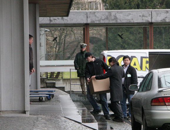 Die Vollmachten der Beschwerdeführer zur Klage gegen die Vorratsdatenspeicherung werden beim Bundesverfassungsgericht in Karlsruhe eingereicht.